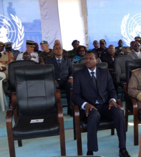 Le Premier ministre centrafricain Mahamat Kamoun et le ministre camerounais de la Défense Edgard Alain Mebe Ngo'o sont présents. Cérémonie en hommage aux troupes africaines par la Présidente de la Transition centrafricaine Catherine Samba-Panza